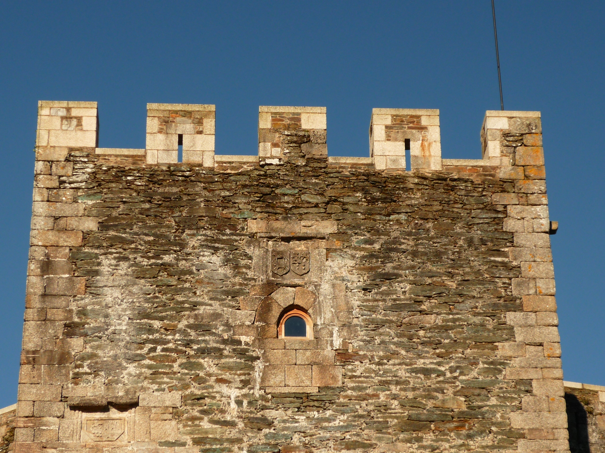 NO Concello do mesmo nome (provincia de A Coruña) NO Concello do mesmo nome (provincia de A Coruña)